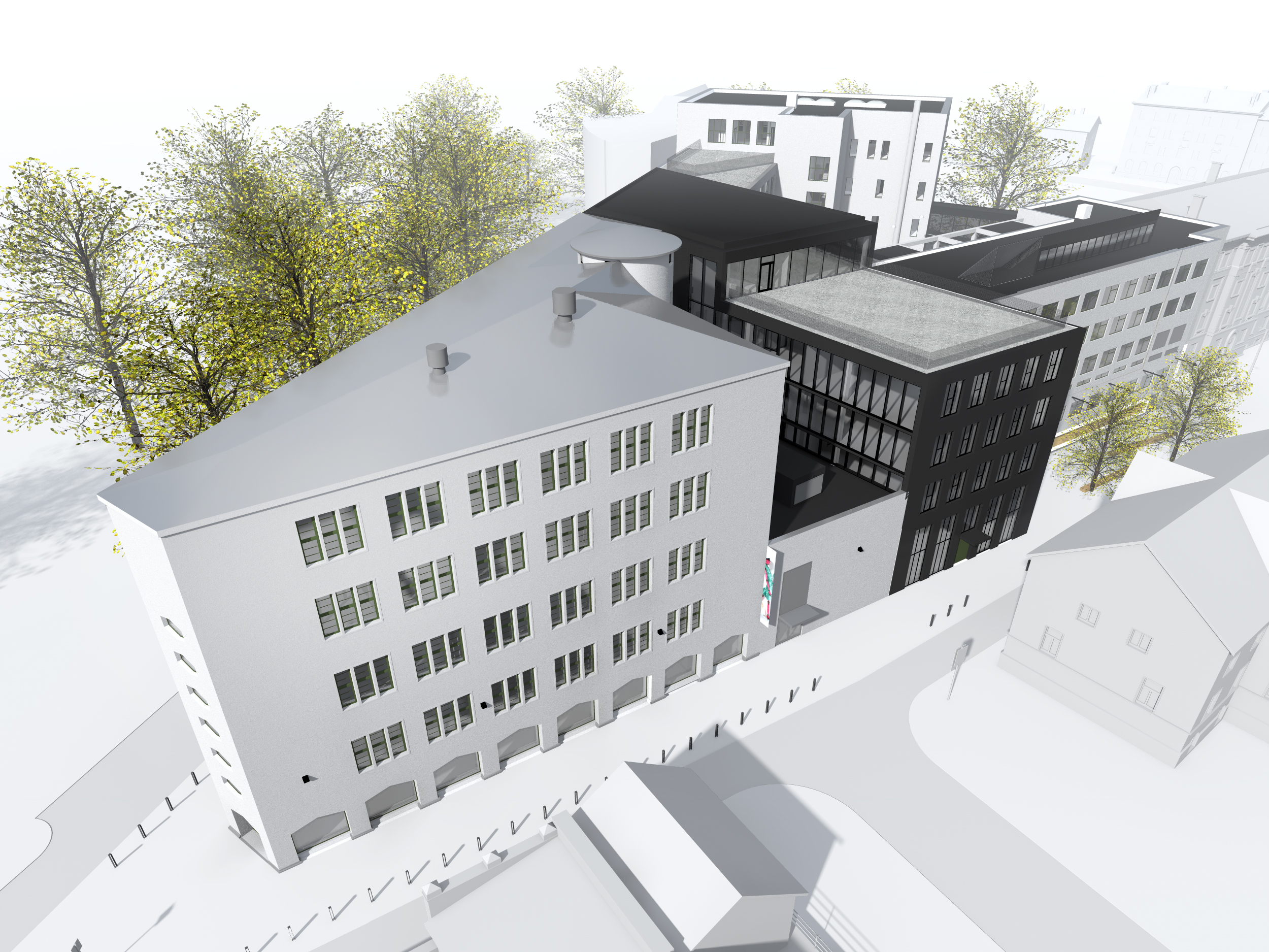 Eesti Kunstiakadeemia tulevane õppehoone valmib 2018. Autorid: KUU Arhitektid (Joel Kopli, Koit Ojaliiv, Juhan Rohtla, Eik Hermann). Hoone paikneb Tallinnas Kalamaja ja vanalinna piiril aadressil Kotzebue 1/Põhja pst 7.